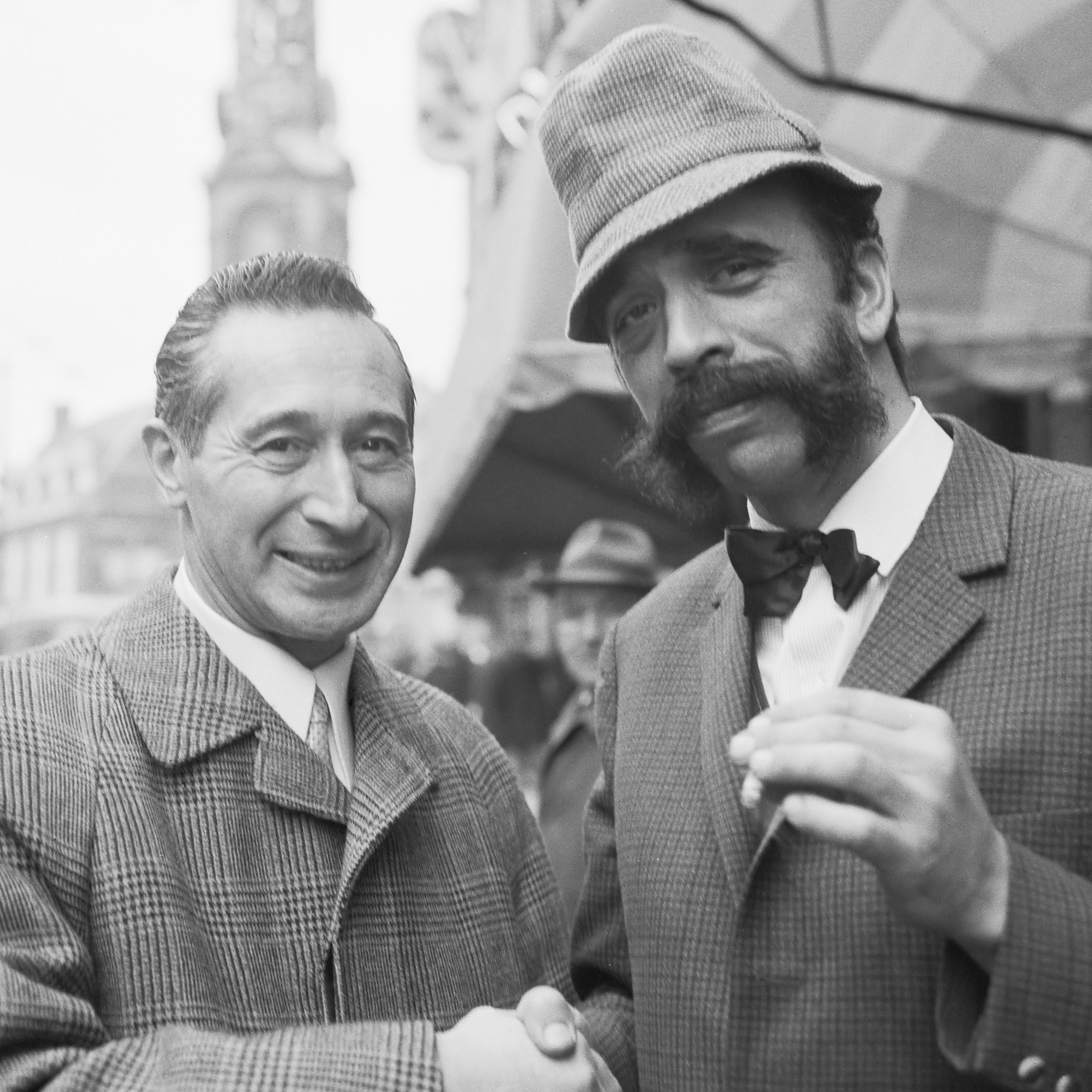 Hein Fentener van Vlissingen kocht parachute bij Lou Lap 11 november 1965